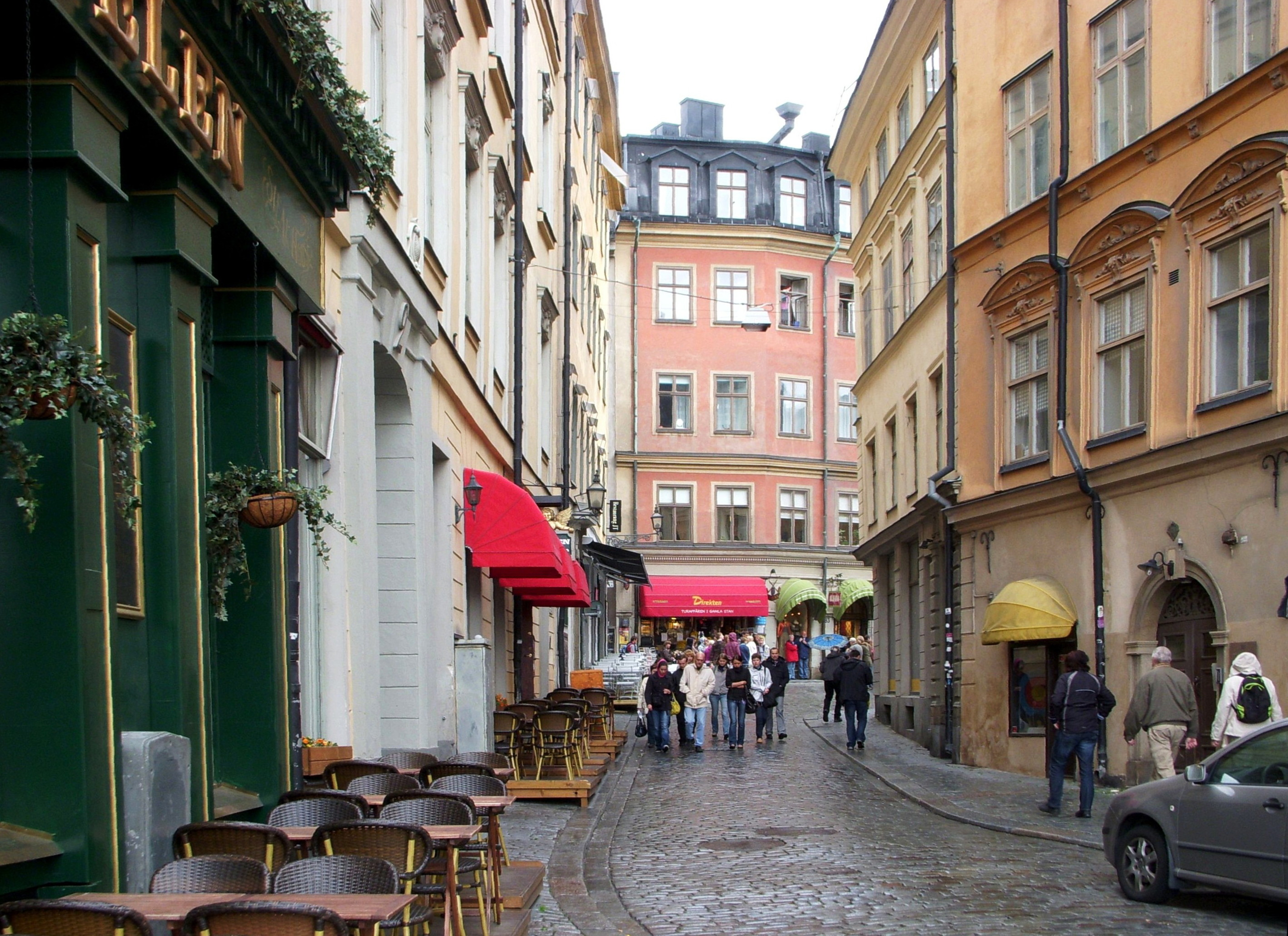 Triewalds gränd, Gamla stan, Stockholm, vy mot norr